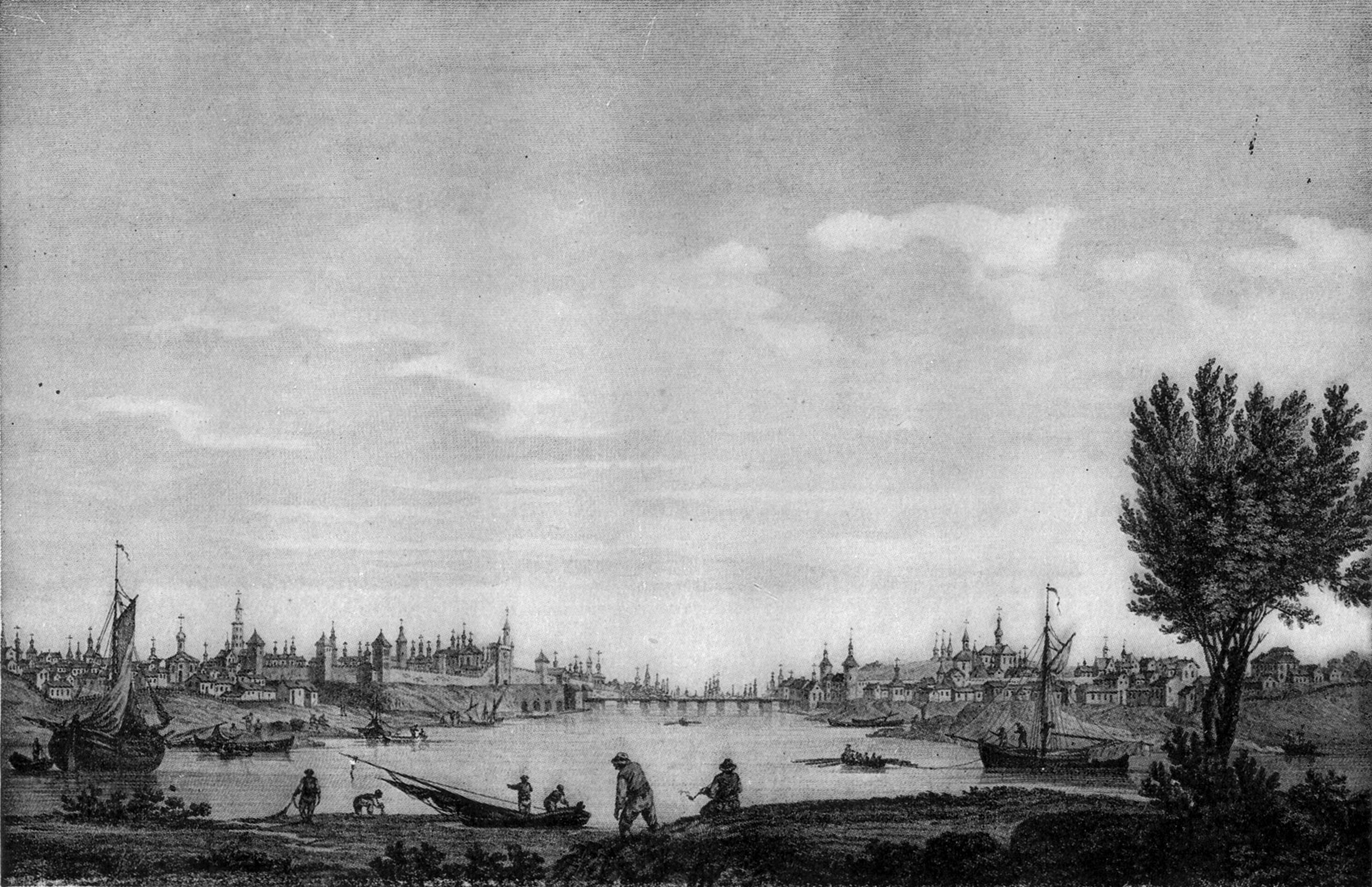 NOVGOROD.